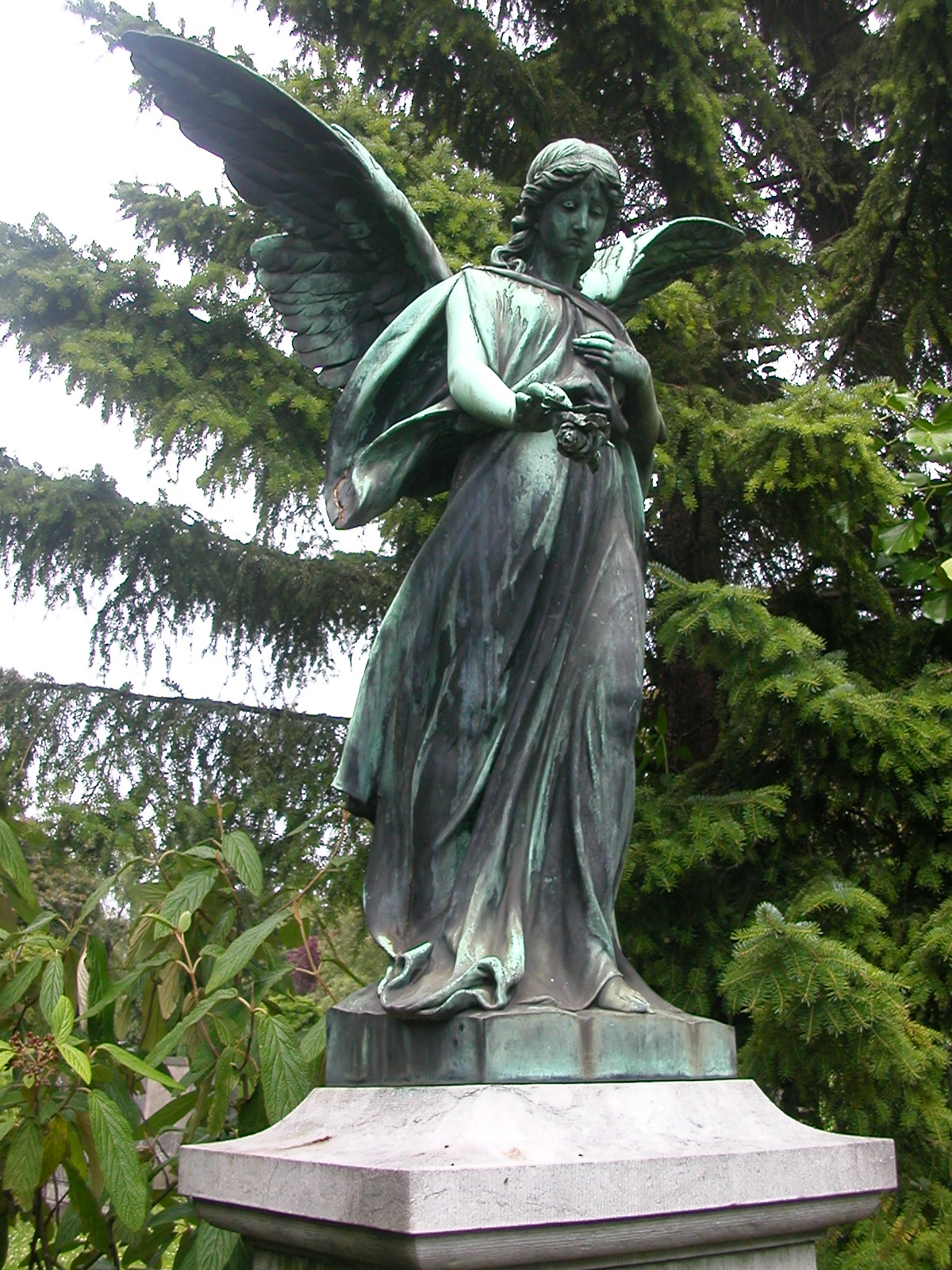 Engel-Darstellung in Galvanoplastik auf dem Grabmal Schöbel-Nadenau in Aachen, Ostfriedhof. Hersteller: WMF Abteilung für Galvanoplastik in Geislingen an der Steige.